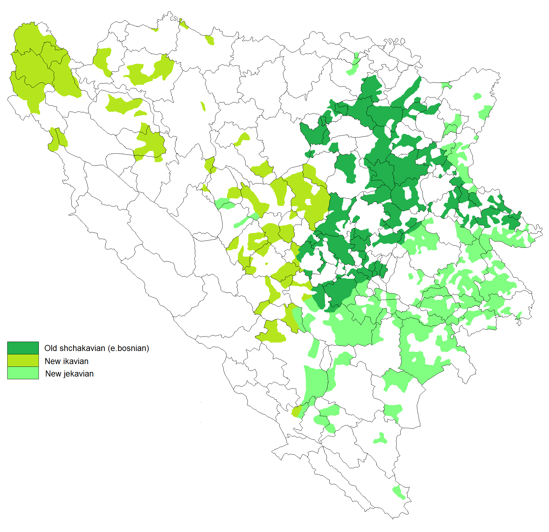 Podacipreuzeti s; i Datoteka predstavlja tri dijalekta kojima su prije rata 91 govorili BiH Muslimani/Bošnjaci.